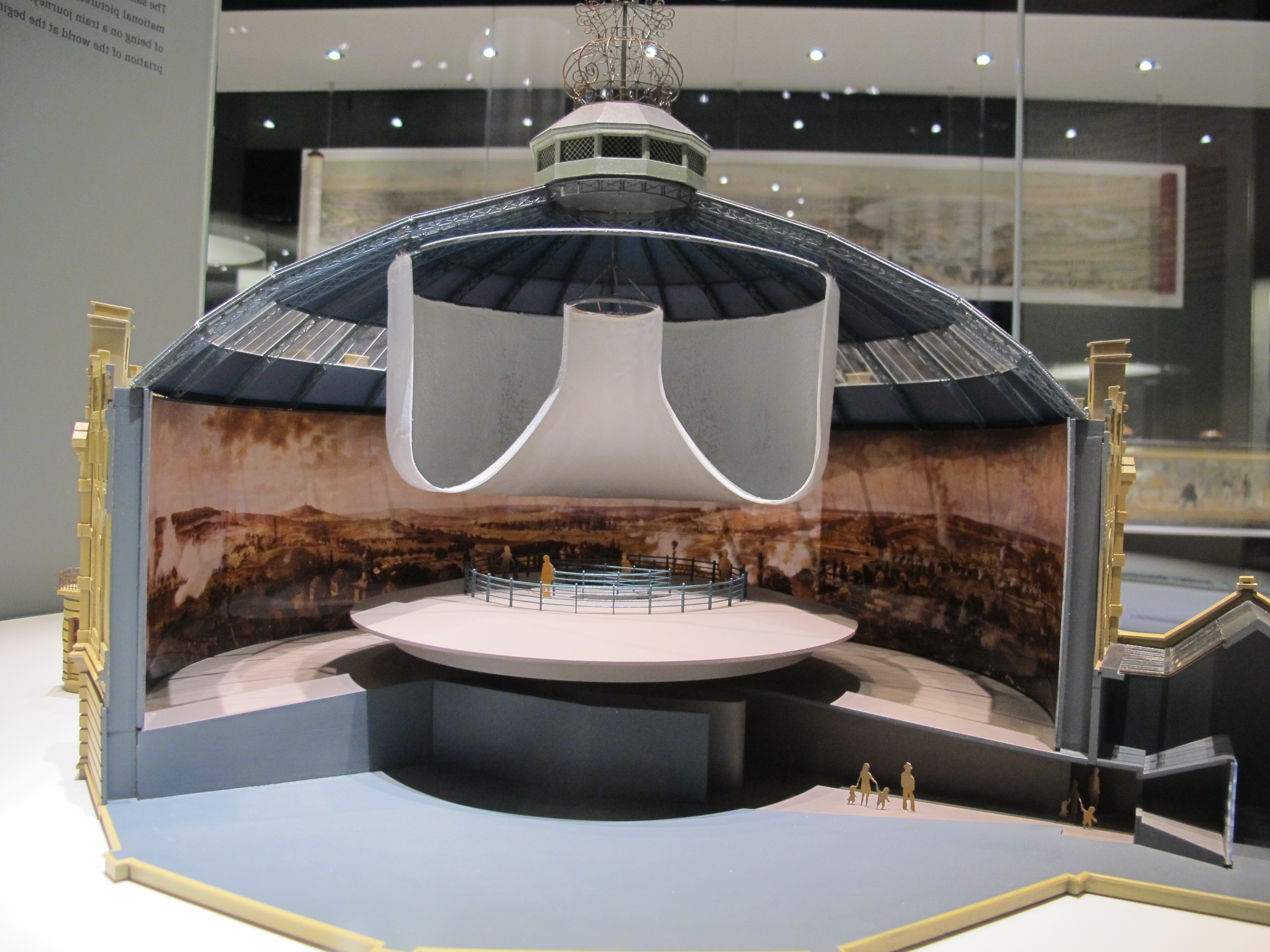 Modello del panorama di francoforte, 1880